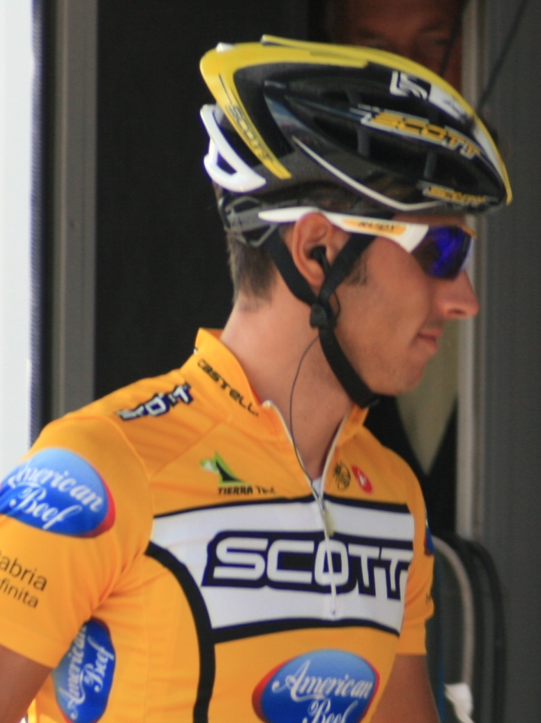 Eros Capecchi, à l'Eneco Tour 2008, à Ardooie